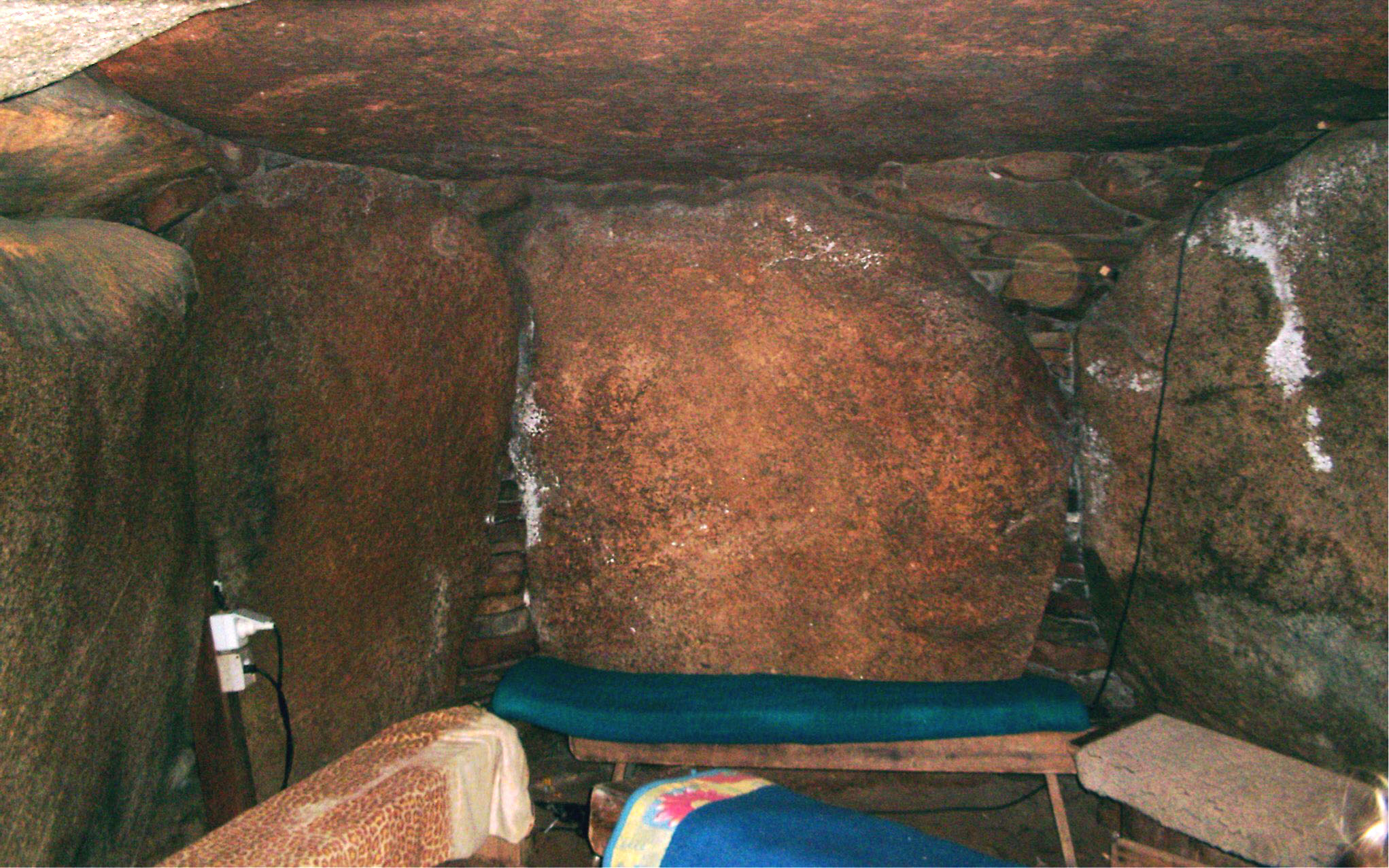 Ort: Sylt (Denghoog - Wenningstedt) (13. Mai 2005)